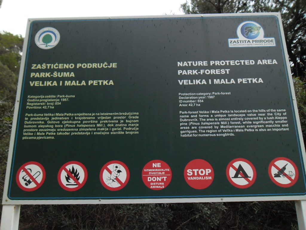 ploča na ulazu u park-šumu Petku, Dubrovnik